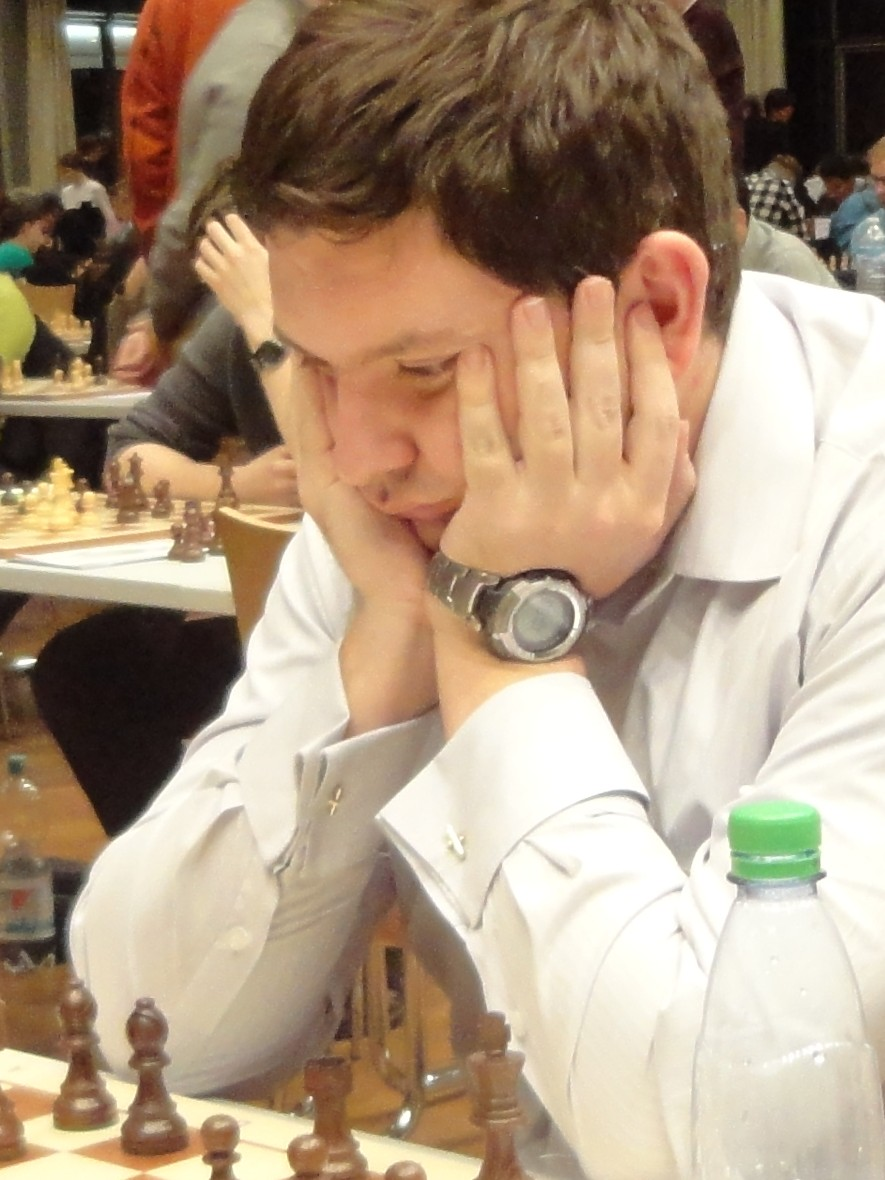 Alexander Moiseenko, Grenke Chess Open 2016 in Karlsruhe, Runde 1